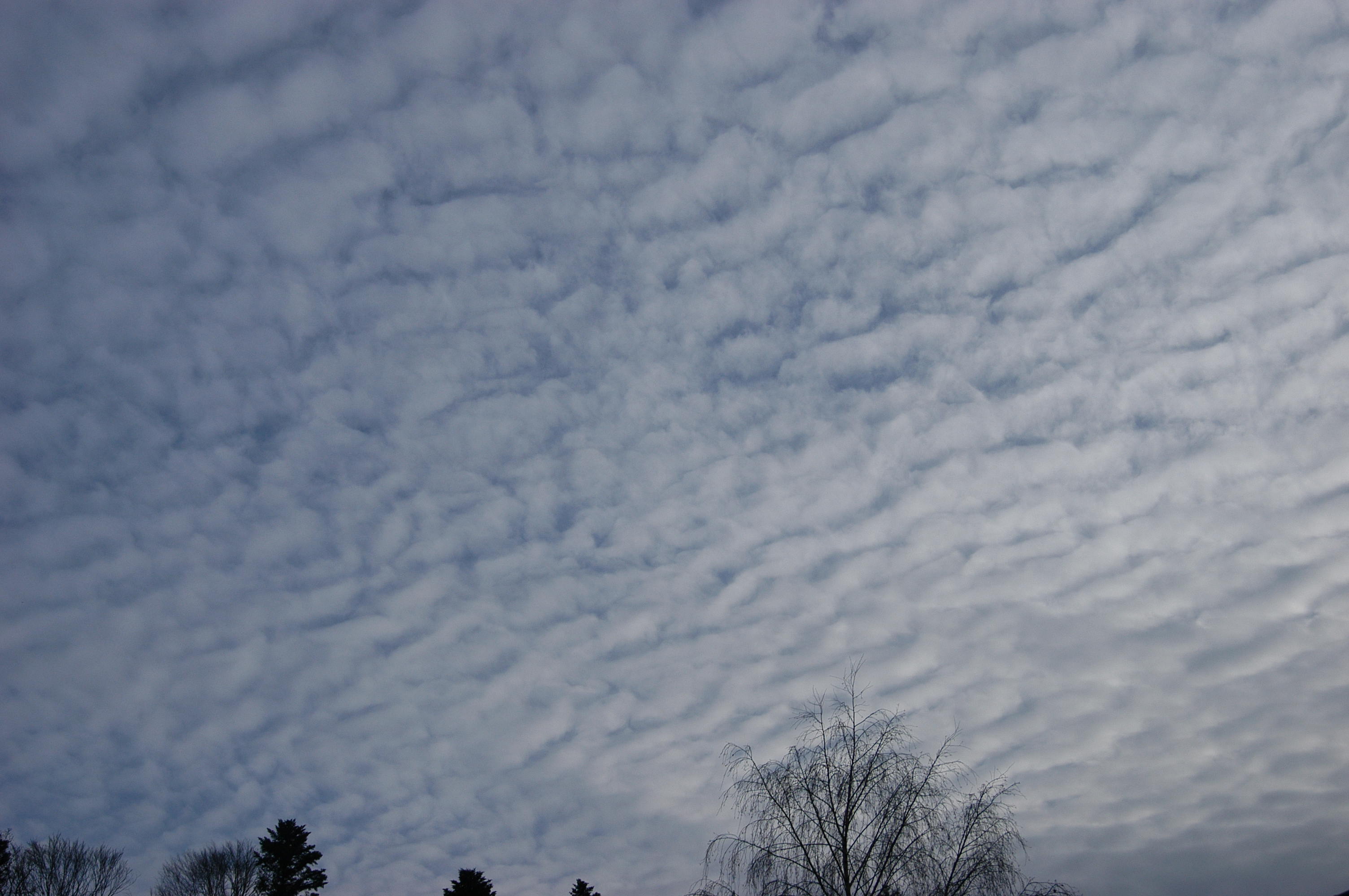 Subject: Altocumulus stratiformis undulatus Aufnahmeort/Place: Schweiz, SG